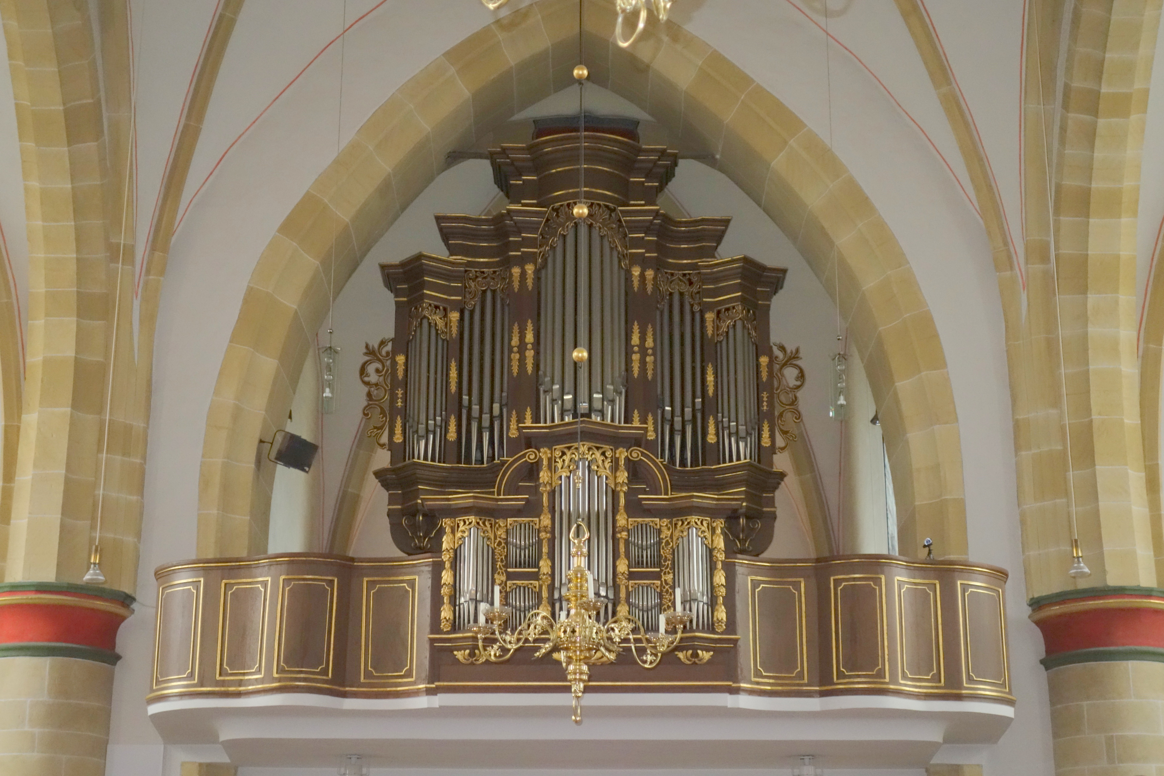 St. Gertrud Horstmar, Kreis Steinfurt, Nordrhein-Westfalen, Deutschland